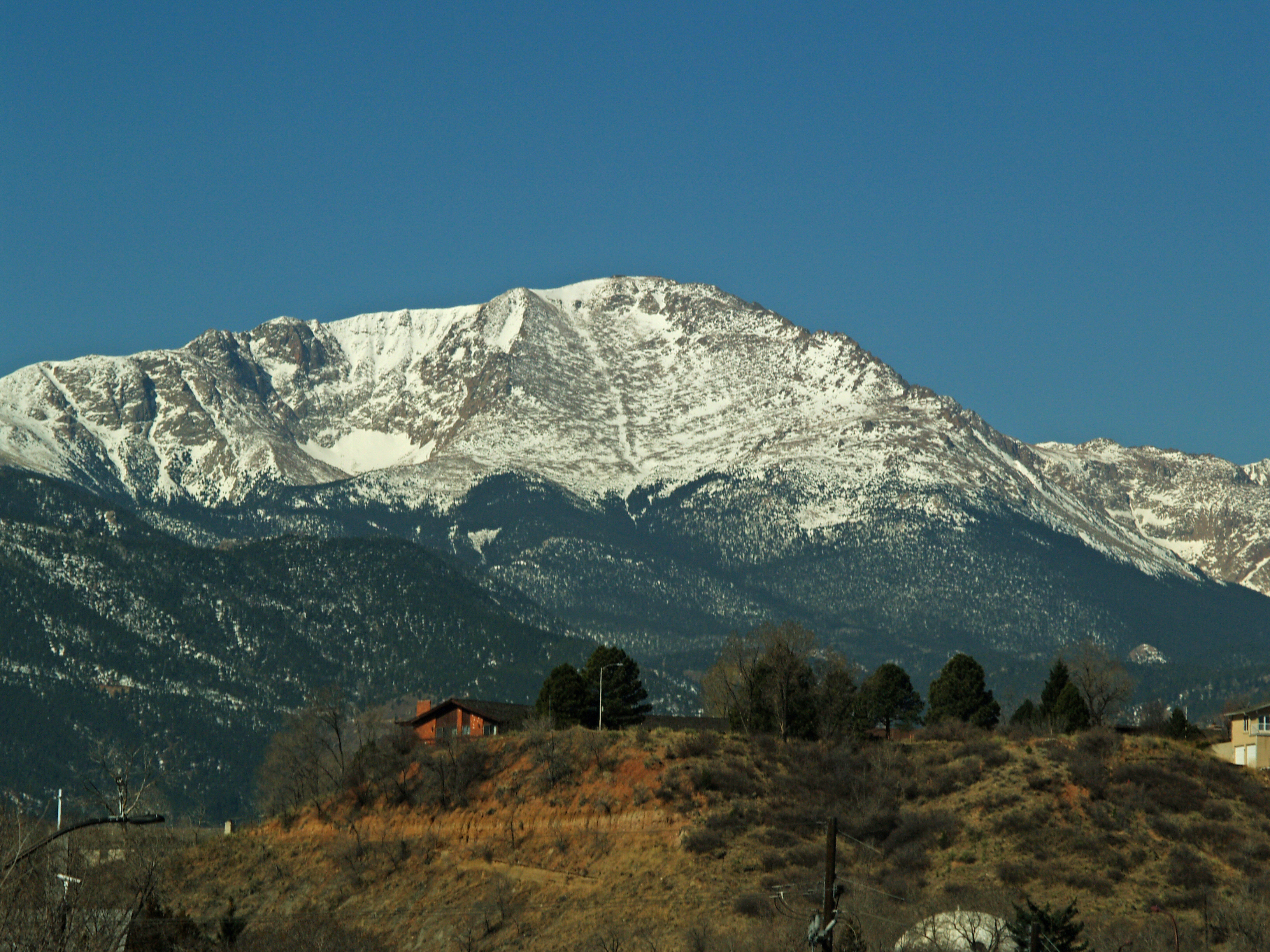 Pike's Peak in Colorado, USA.